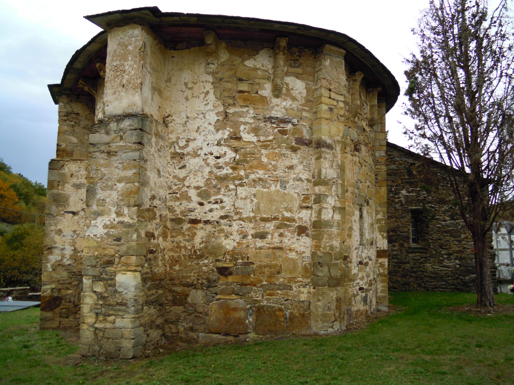 Igrexa parroquial de Santo André (As Nogais).